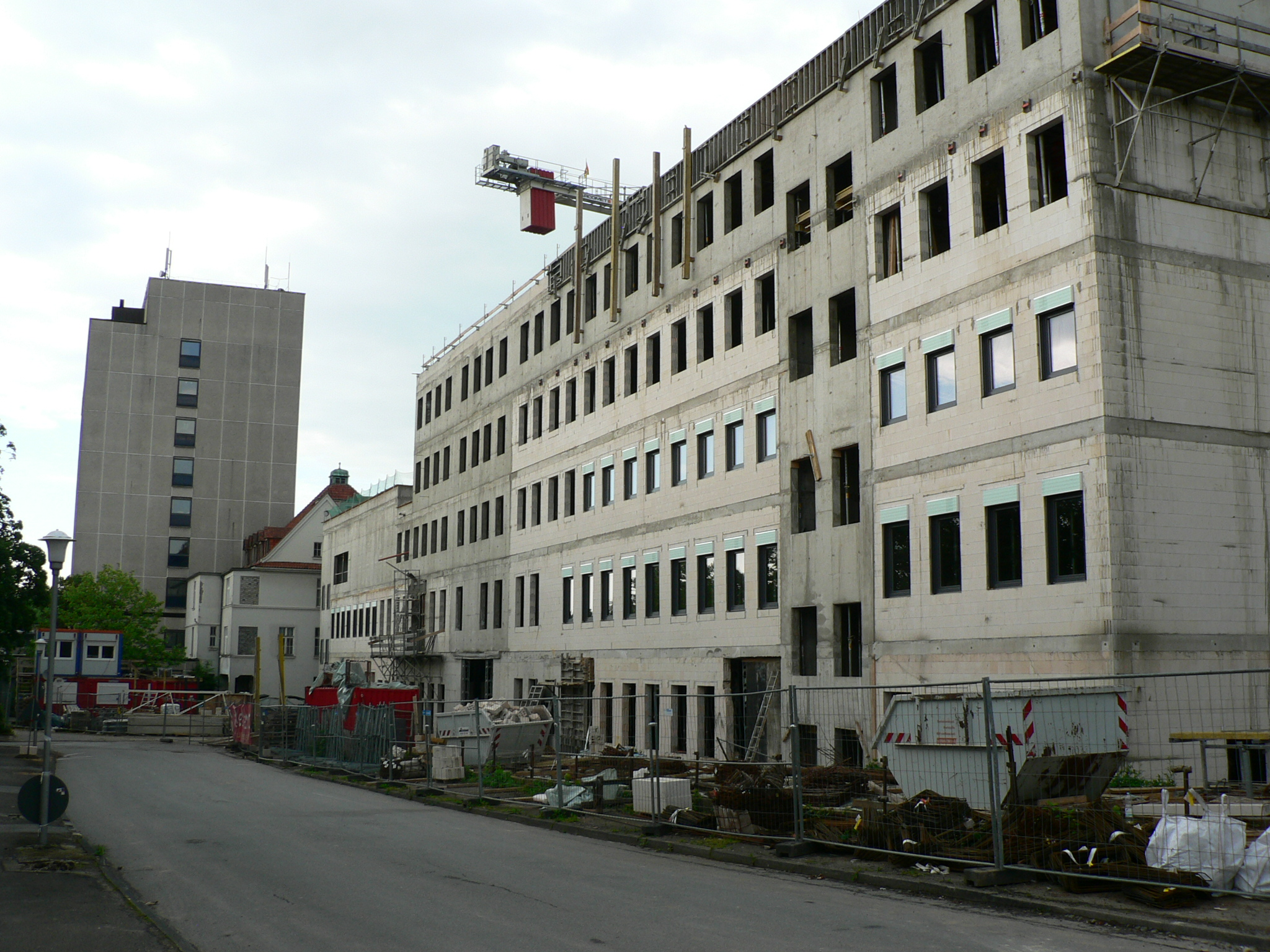 Rohbau des Neubaus des St. Petri Hospitals, Warburg.